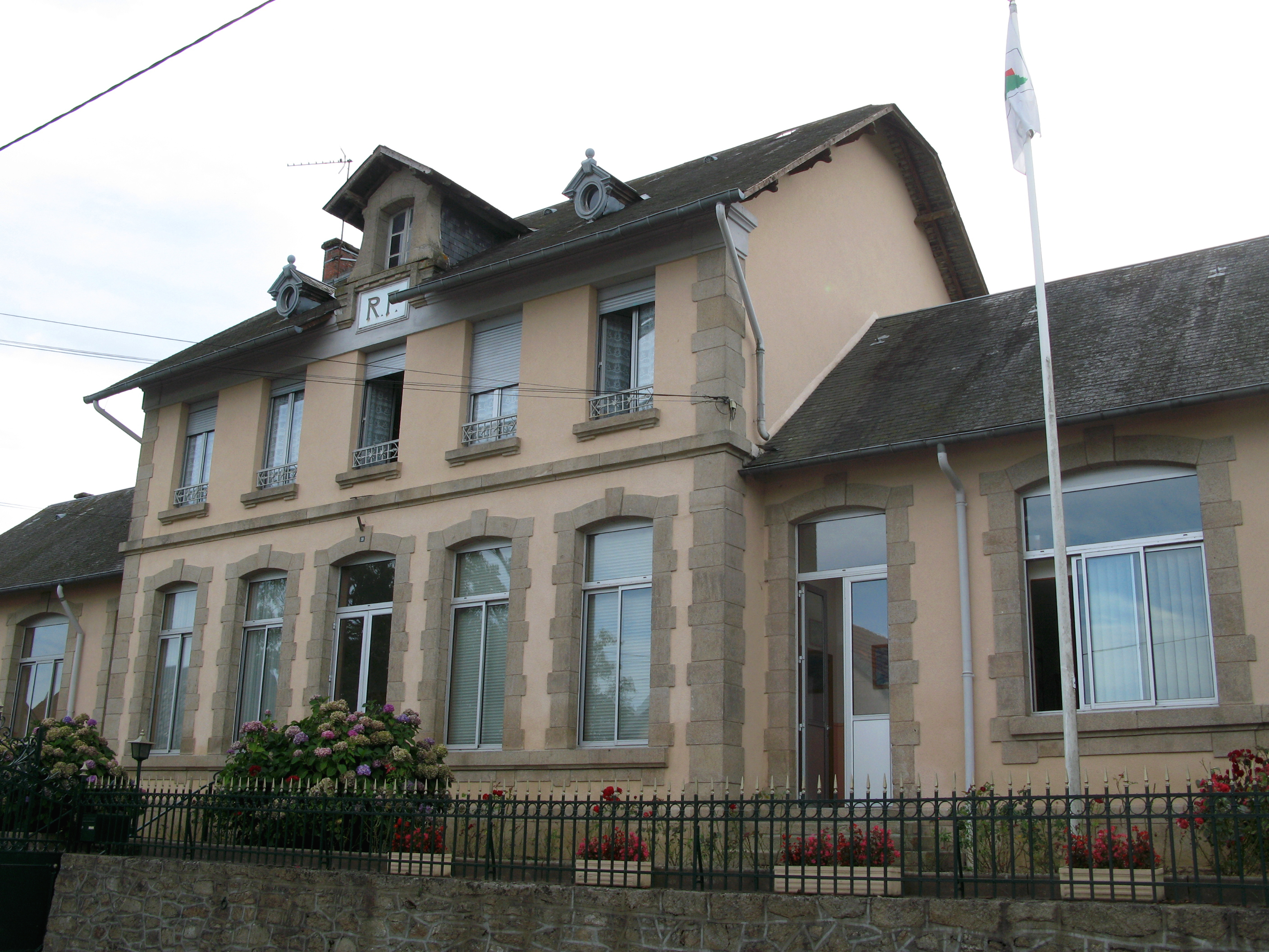 Saint-Germain-Beaupré (Creuse, France) - La mairie. . .